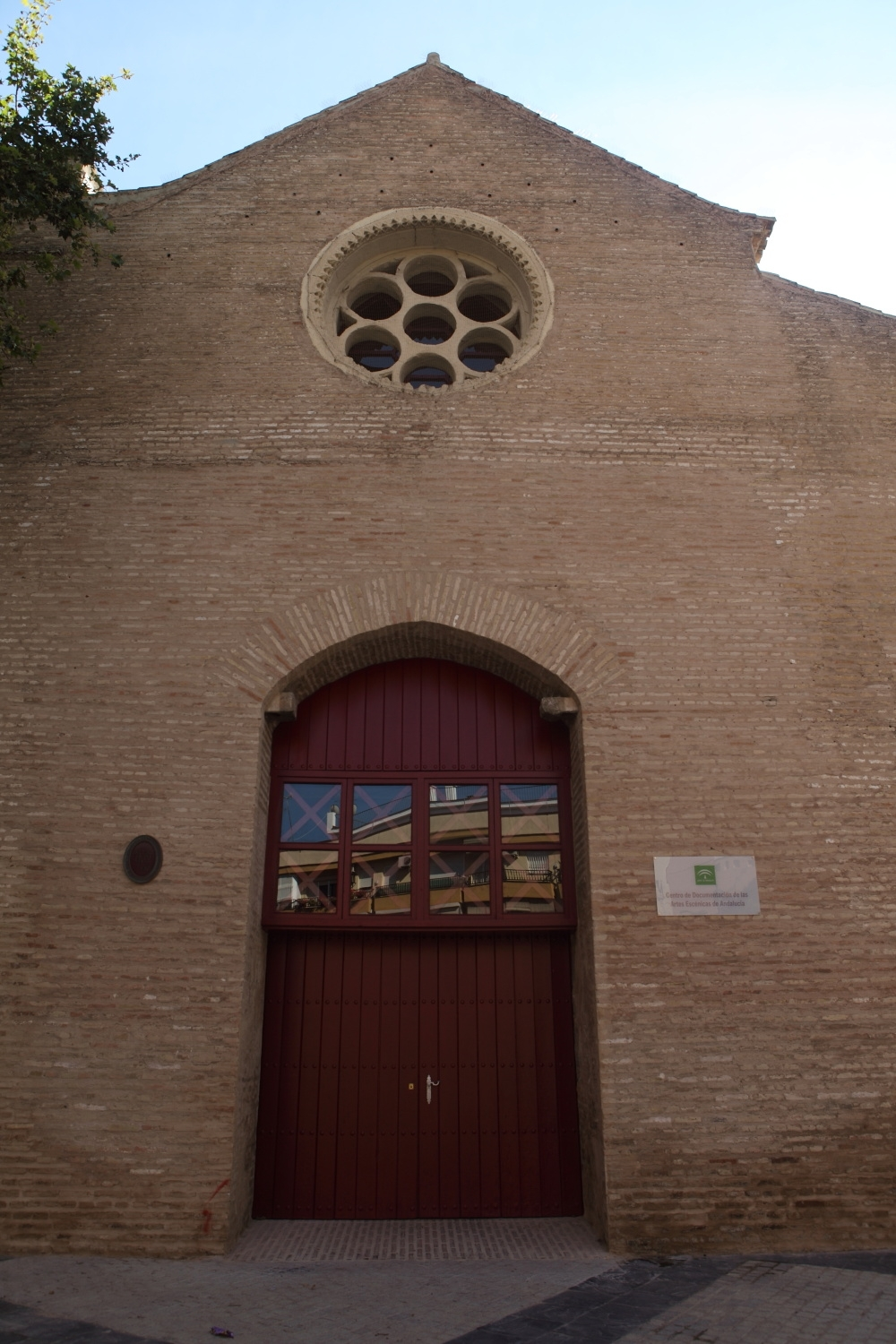 La Iglesia Sta. Lucía: nueva sede del Centro de Documentación de las Artes Escénicas de Andalucía